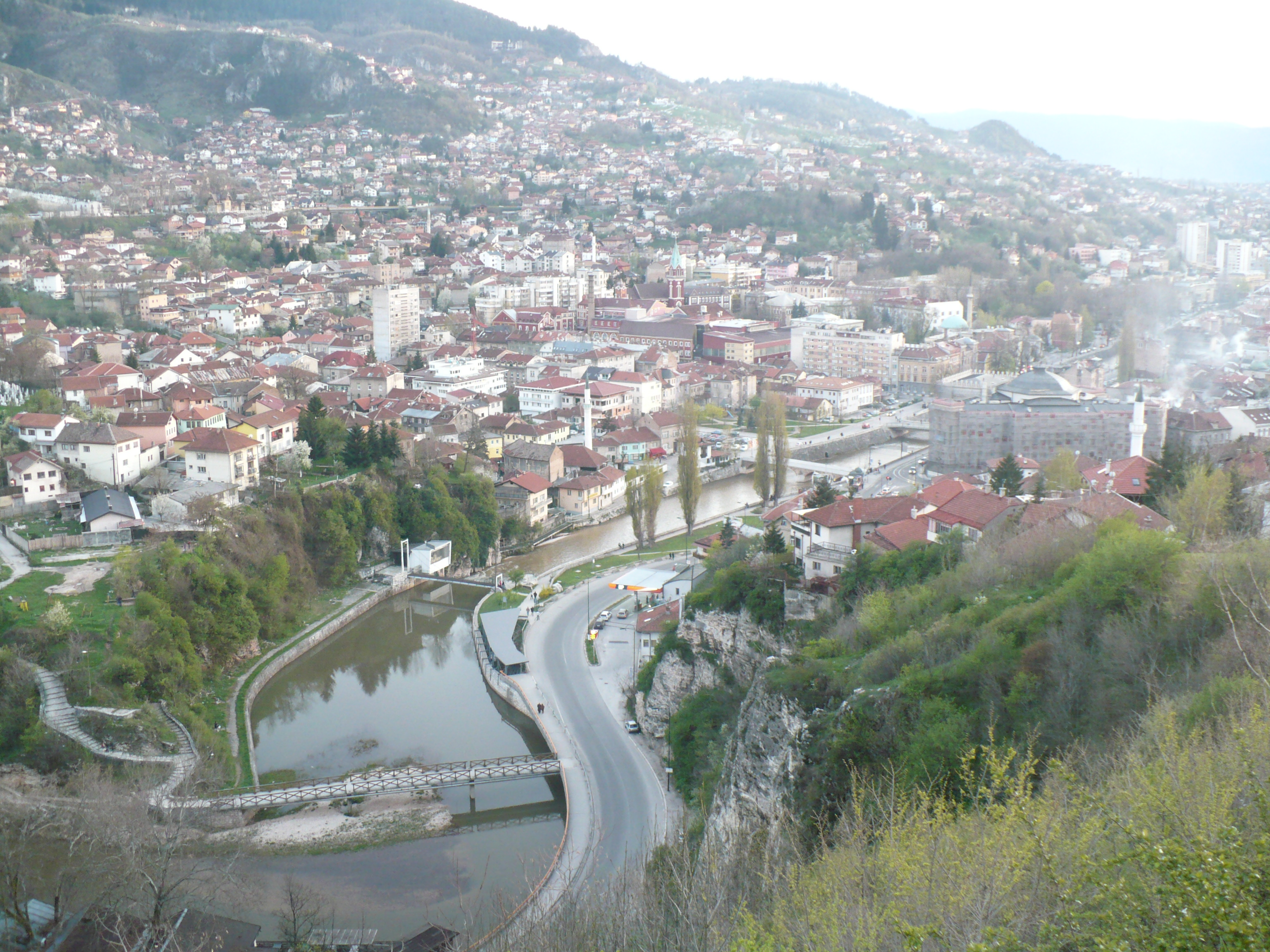 Saraybosna, Bosna-Hersek